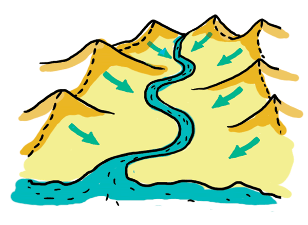 유역의 이해를 돕기 위한 그림